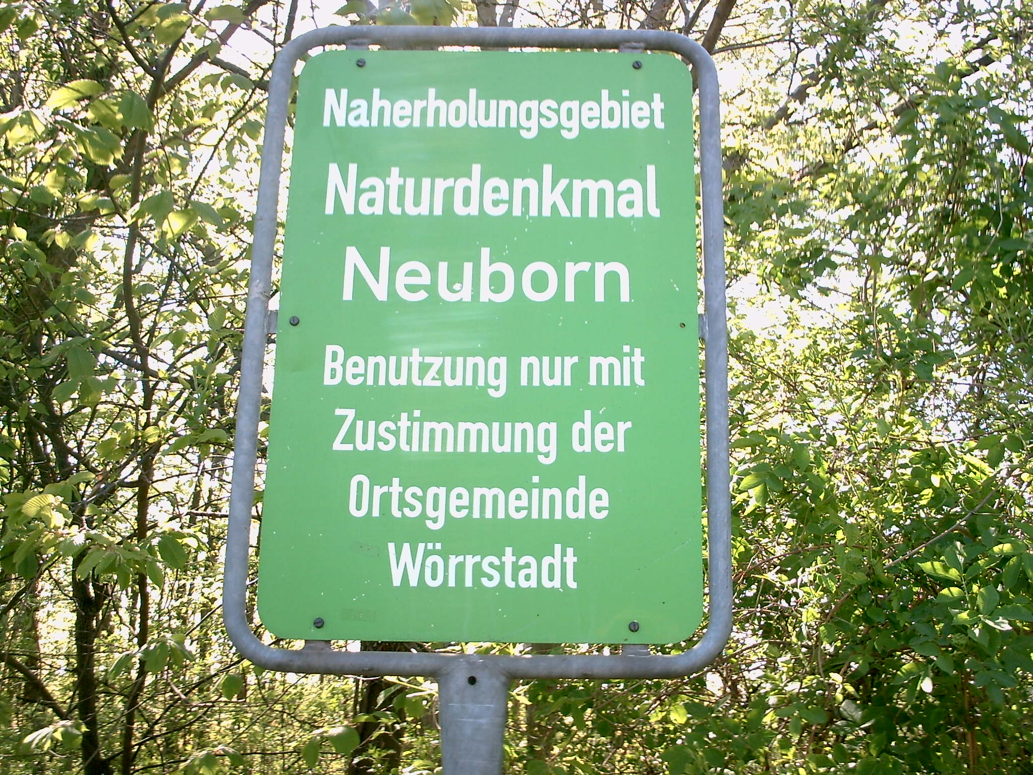 Das Schild am Waldrand des Neuborns